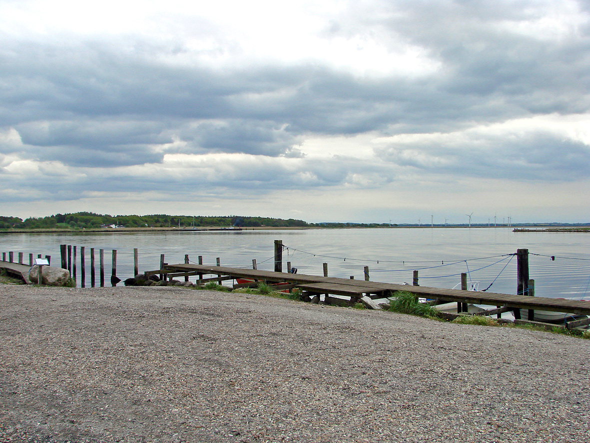 Randers Fjord ved Mellerup. I baggrunden ses Voer Færgested